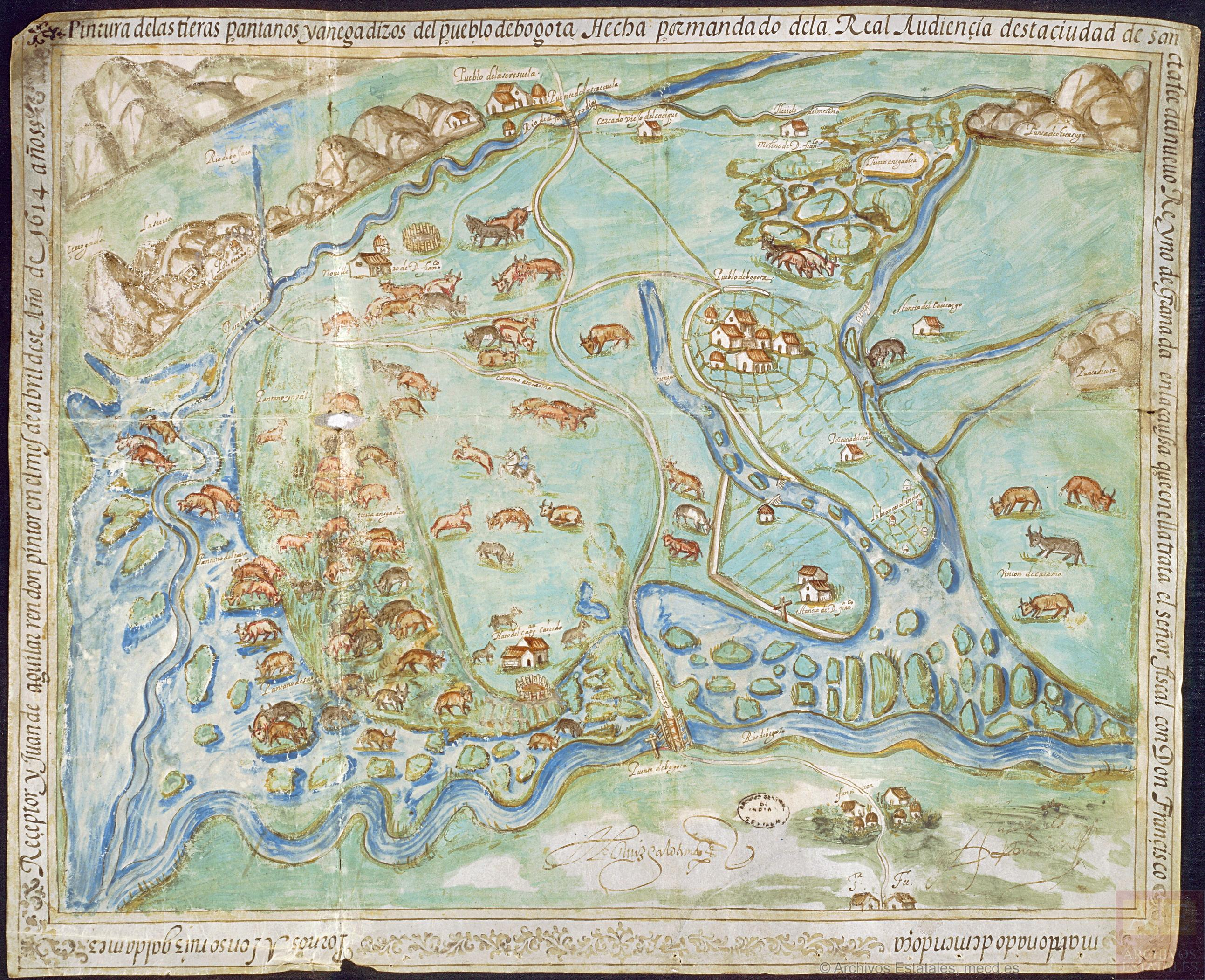 Pintura de las tierras, pantanos y anegadizos del pueblo de Bogotá hecha por mandato de la Real Audiencia desta çiudad de Sancta Fee del Nuevo Reyno de Granada en la causa que en ella trata el señor fiscal con don Francisco Maldonado de Mendoça. Por nos Alonso Ruiz Galdámez, receptor y Juan de Aguilar Rendón, pintor, en el mes de abril deste año de 1614 años